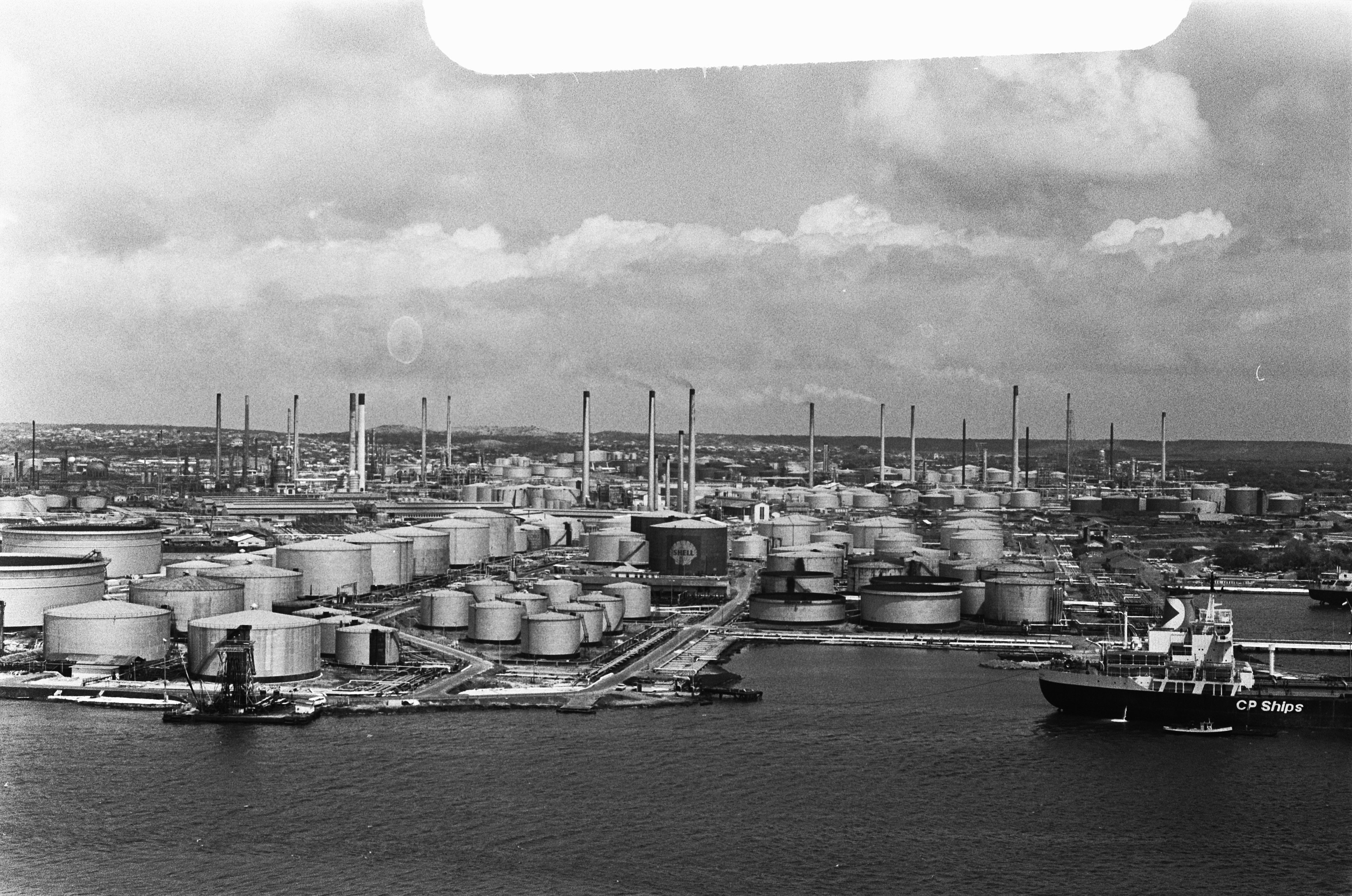 Collectie / Archief : Fotocollectie Anefo Reportage / Serie : [ onbekend ] Beschrijving : Curacao, Willemstad; overzicht haven Shell, straatbeeld Datum : 1 april 1975 Locatie : Curacao, Willemstad Trefwoorden : Straatbeelden, havens, overzichten Instellingsnaam : Shell Fotograaf : Verhoeff, Bert / Anefo Auteursrechthebbende : Nationaal Archief Materiaalsoort : Negatief (zwart/wit) Nummer archiefinventaris : bekijk toegang 2.24.01.05 Bestanddeelnummer : 927-8471